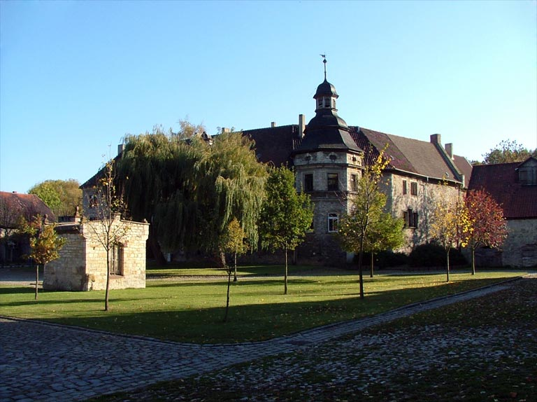 Blick auf den Turm der Burg Krottorf im Ortsteil Krottorf von Gröningen in Sachsen-Anhalt, Deutschland